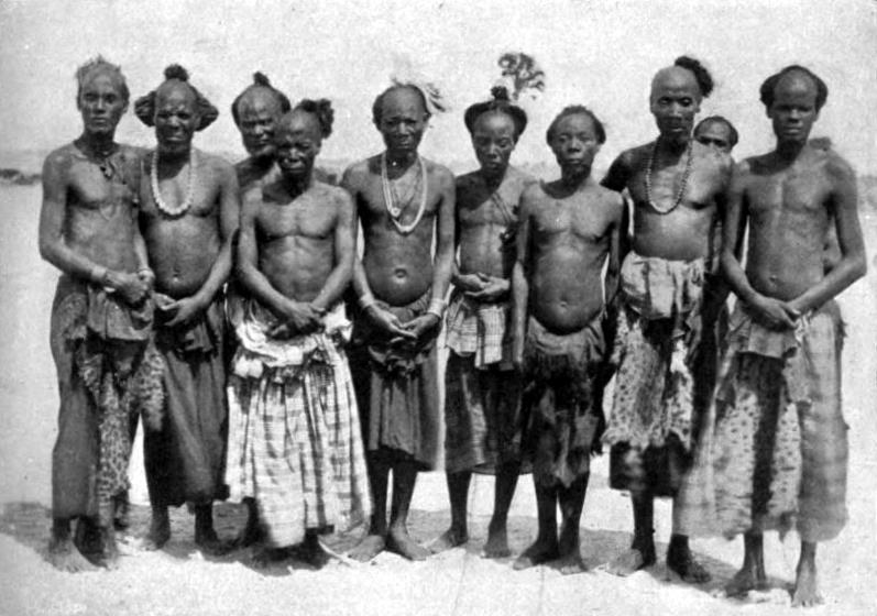 Baluba Chiefs - p. 144